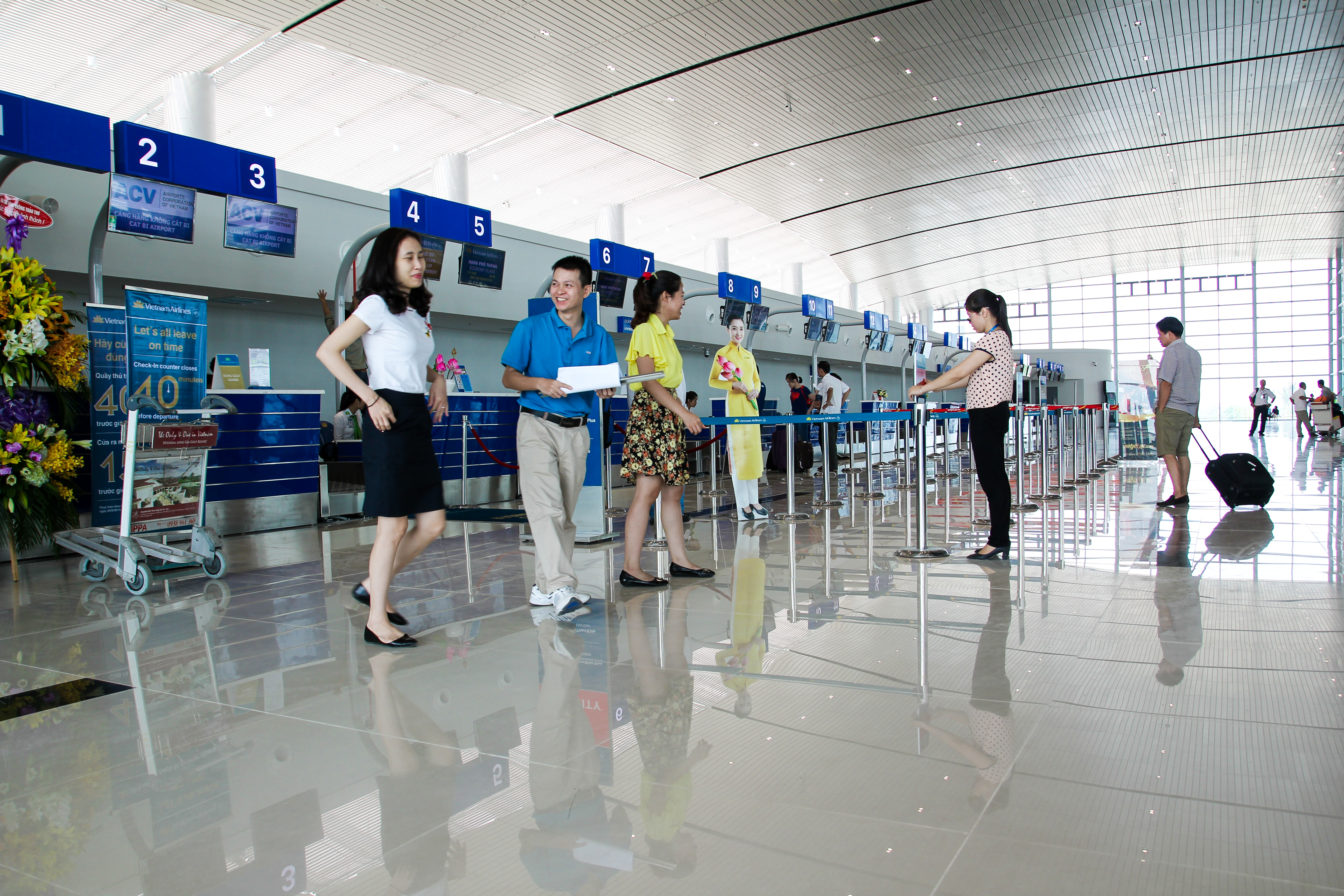 Khu vực check-in cảng hàng không Cát Bi